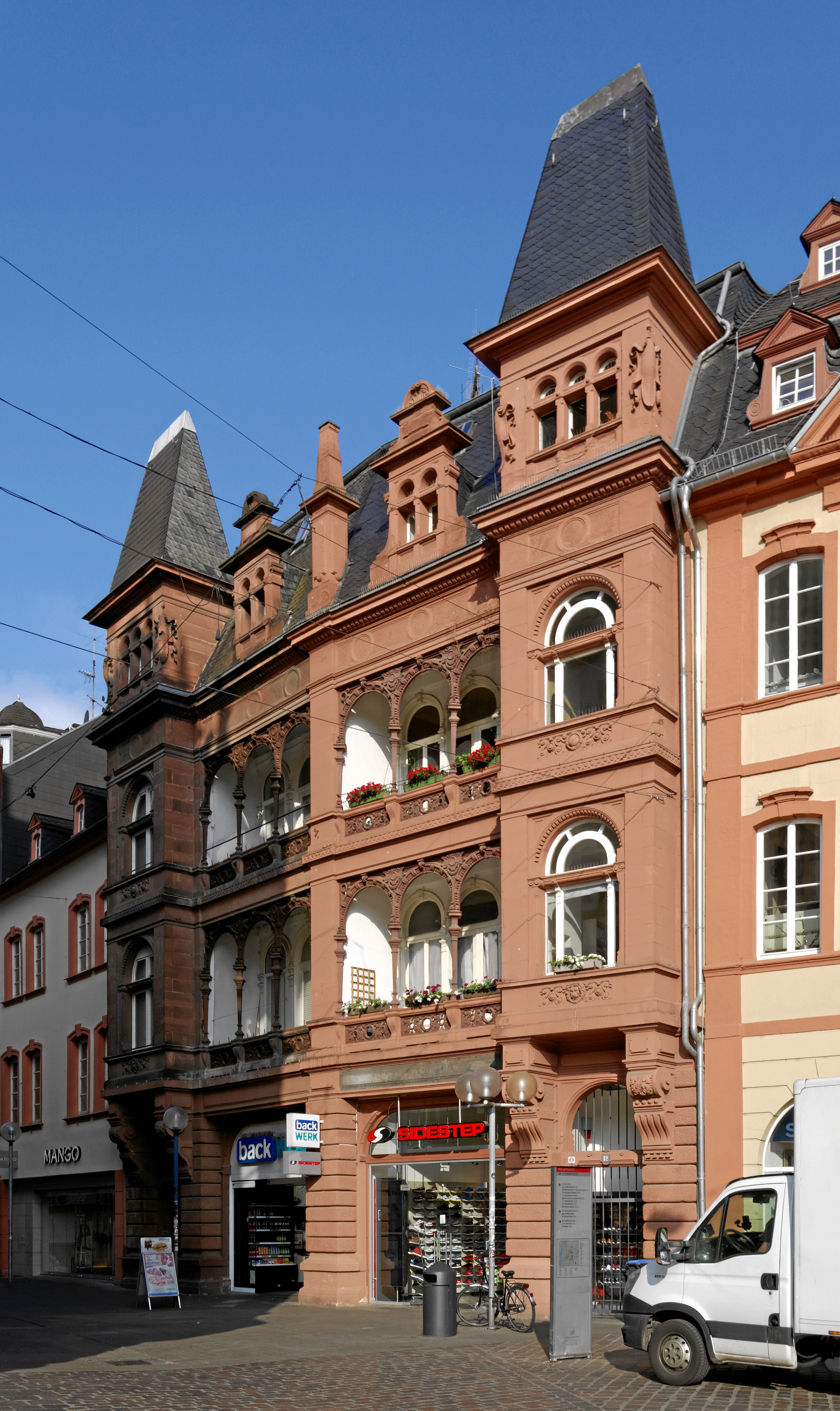 Trier, Fleischstraße 81/82, dreigeschossiges Doppelwohn- und Geschäftshaus, Neurenaissancebau mit Loggien und turmartigen Kastenerkern, 1886/87, Architekt wohl Joseph Weis, über mittelalterlichem Keller; in den Fassaden zwei Spolien, bezeichnet 1565; straßenbildprägend; am Hinterhaus drei spätgotische Kreuzstockfenstergewände (Vorgängerbau